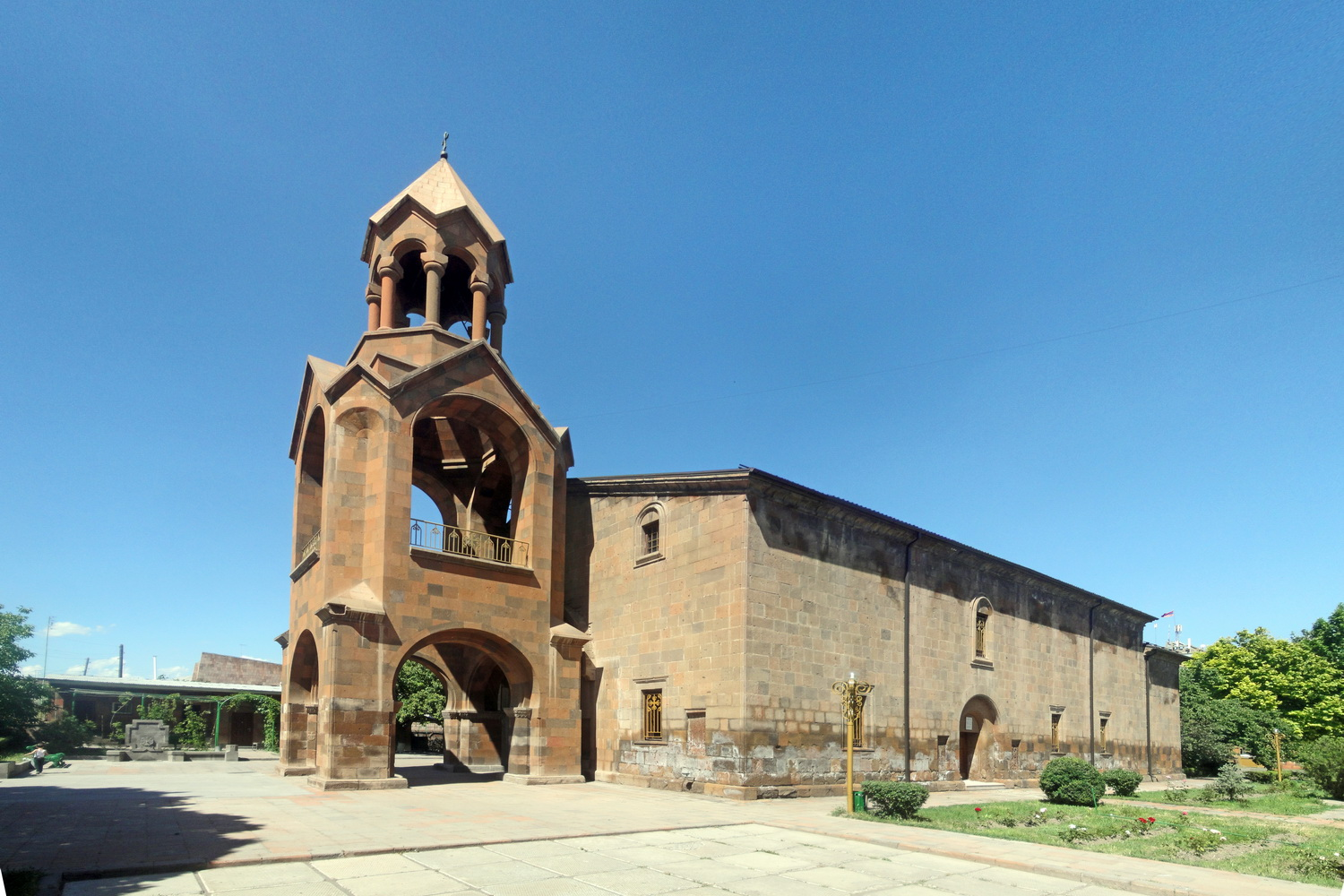 Vagharshapat, S. Astvatsatsin